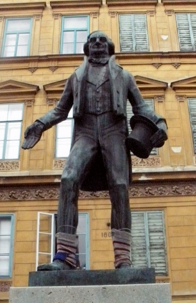 Nestroy Denkmal in Wien, Praterstraße, mit Guerilla Knitting Gamaschen